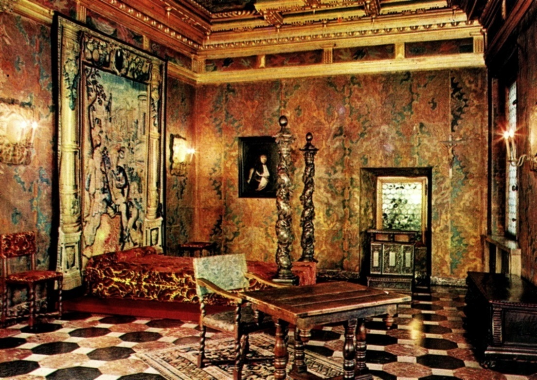 Vasa Bedroom at Wawel Castle.